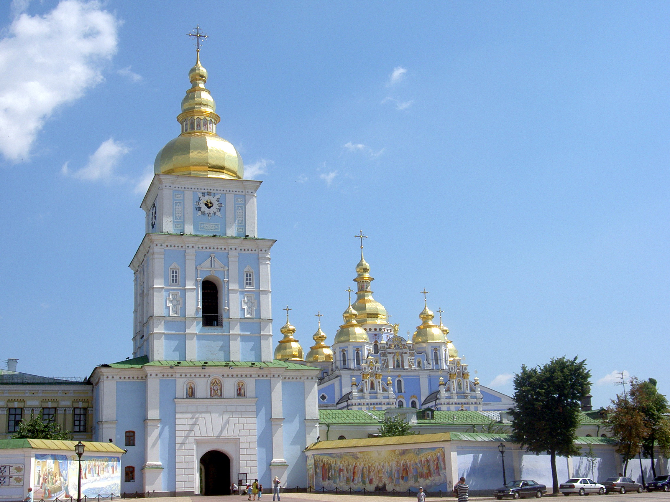 Chrám svatého Michala v Kyjevě